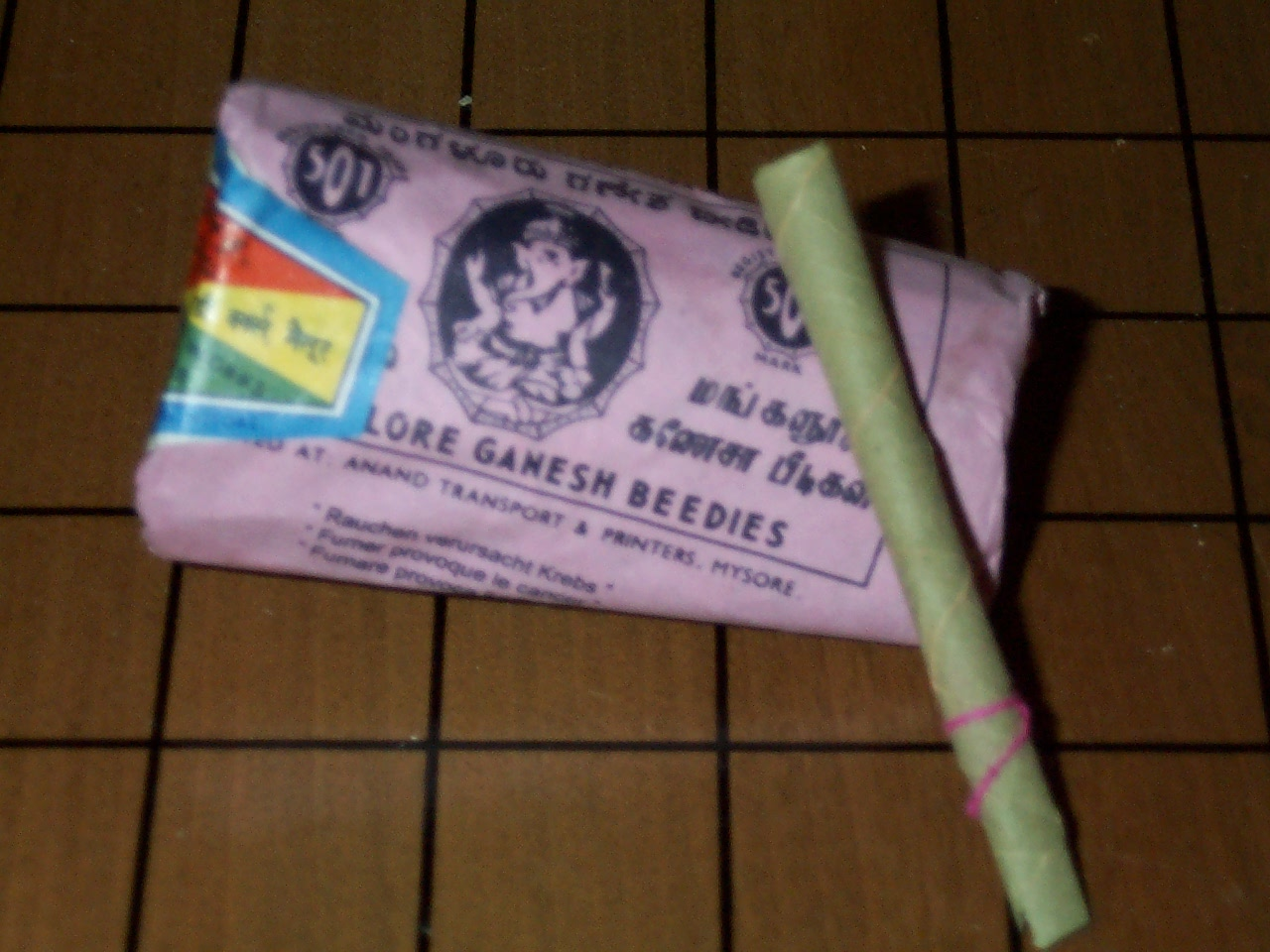 Ein Beedie vor einer Packung Beedies